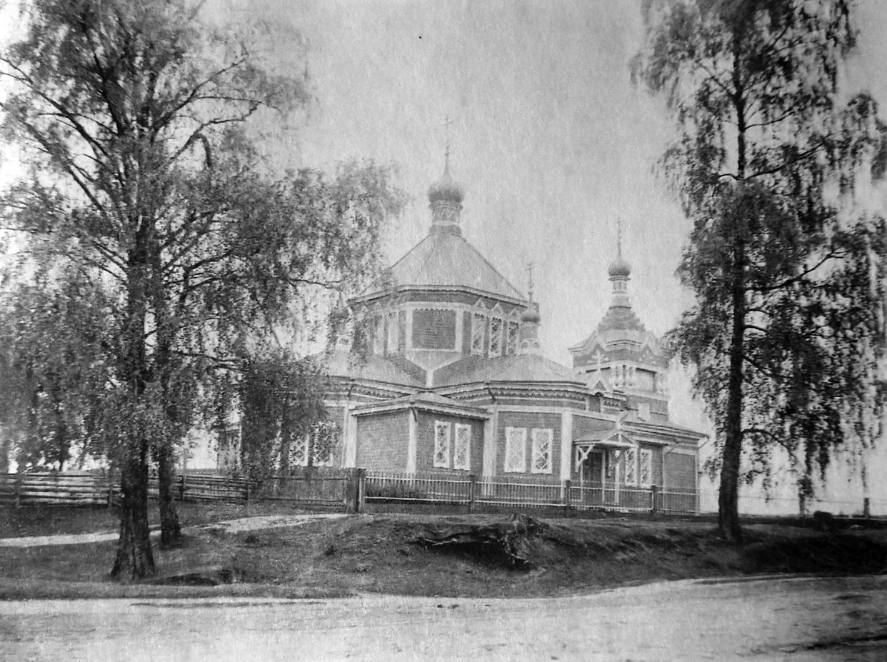 Беларуская (тарашкевіца): Лошніца (Łošnica). Царква-мураўёўка